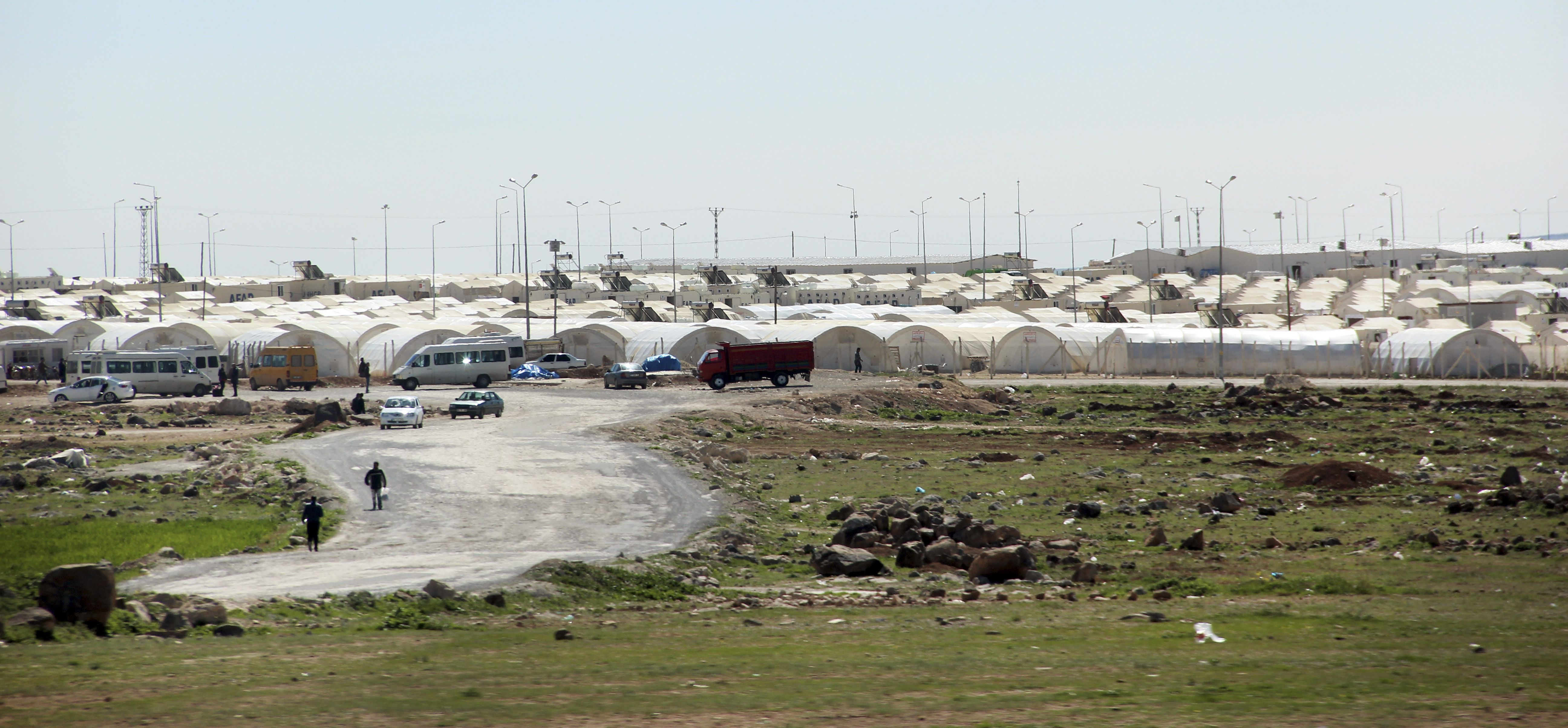 Suruç (Turquia) - Campo de refugiados em Suruç, no Sudeste da Turquia, próximo à fronteira com a Síria. A região ainda sente os efeitos das batalhas na vizinha Kobaine, de onde os curdos expulsaram o Estado Islâmico